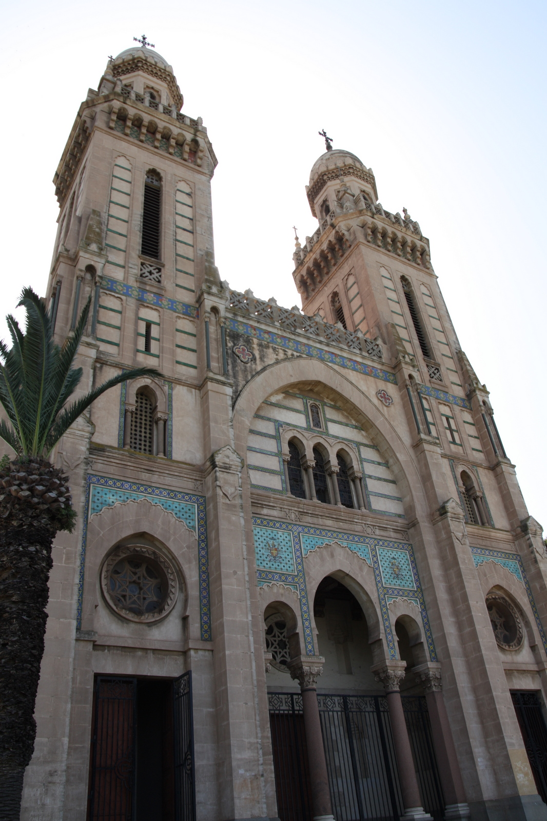 Église Saint-Augustin d'Annaba en mai 2009.